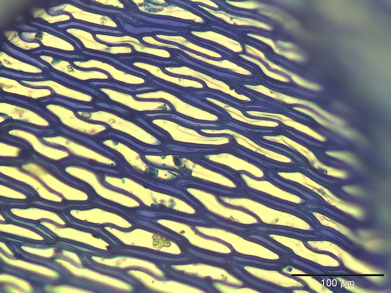 Sphagnum subnitens, Stammblatt-Zellen, 400x